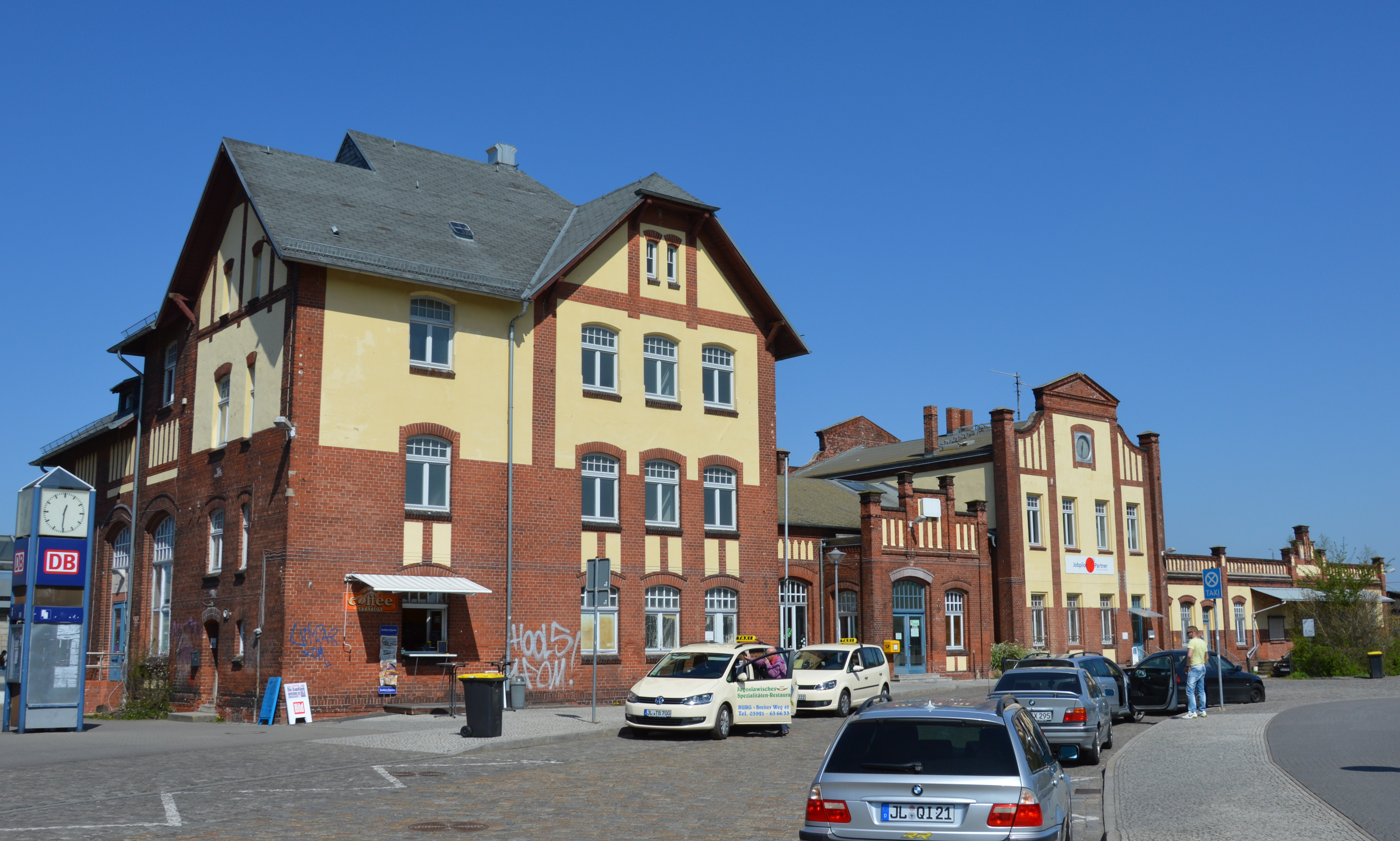 Bahnhof Burg